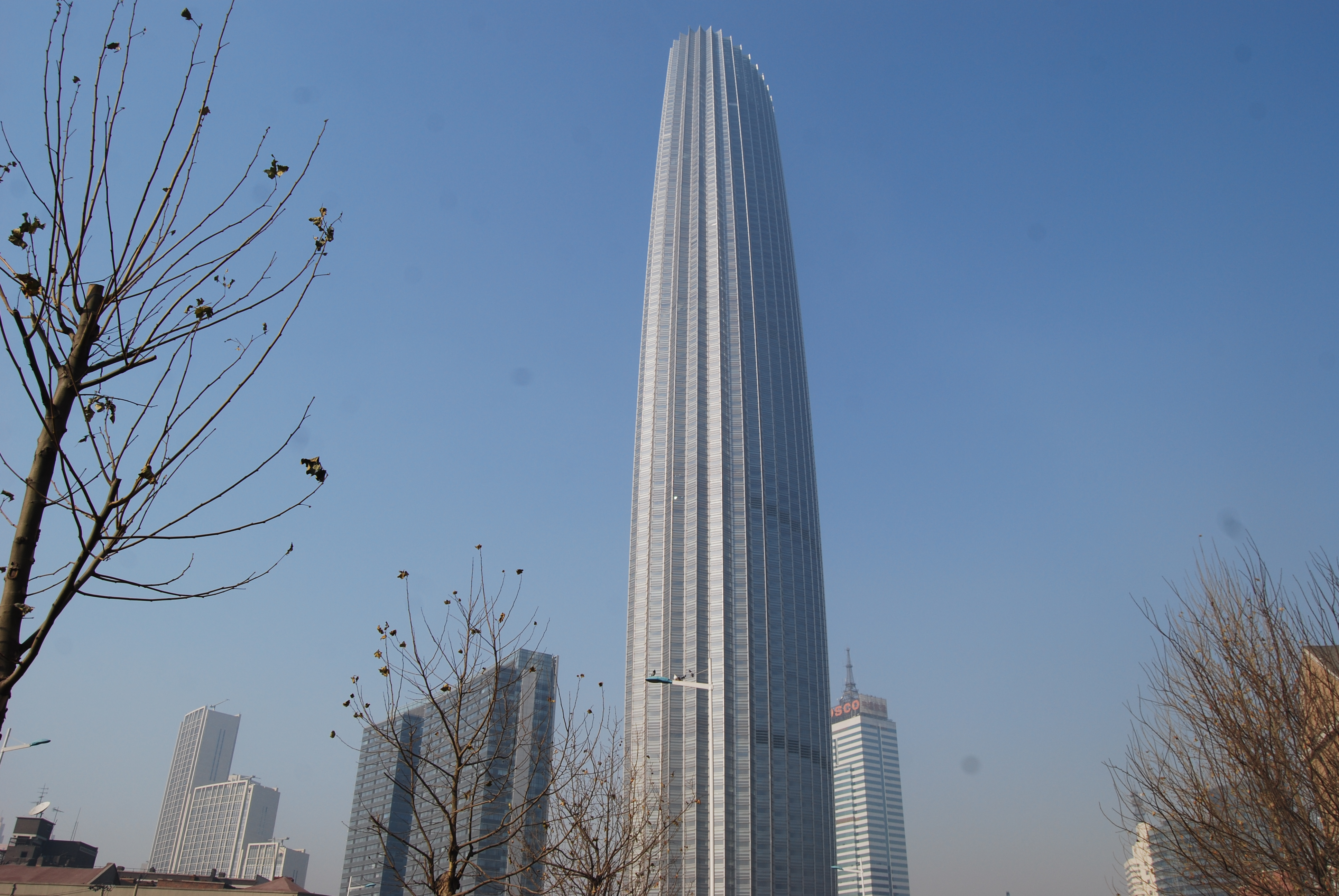 天津环球金融中心的津塔。设计单位：SOM建筑设计事务所